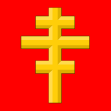 Icon